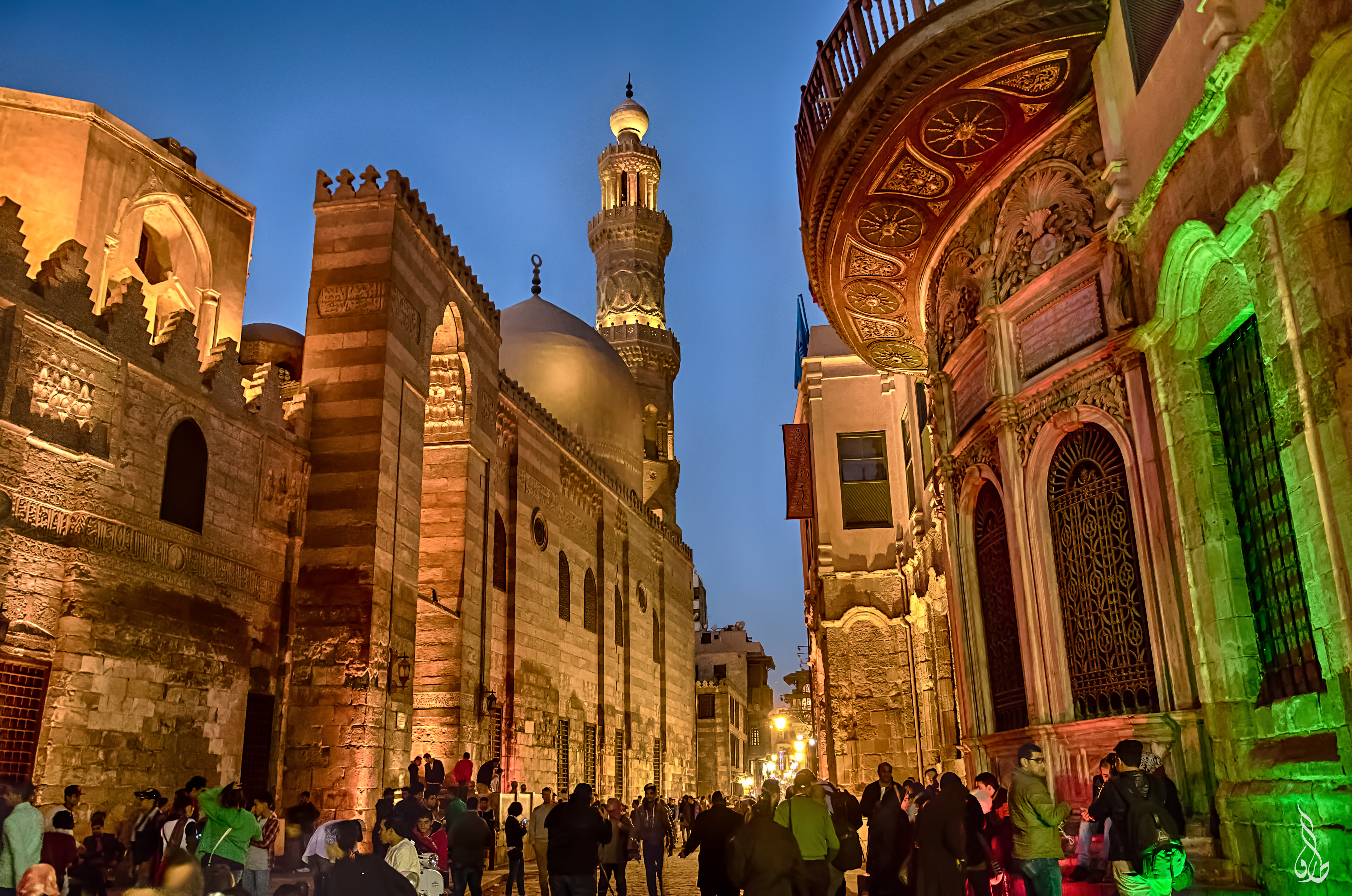 شارع المعز لدين الله الفاطمي ... من اجمل الشوارع التاريخية بالقاهرة القديمة